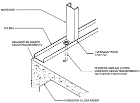 Alternativa de conexión de muro a fundación